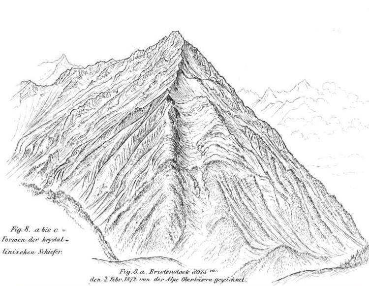 Zeichnung des Bristen von Albert Heim (1849-1937)